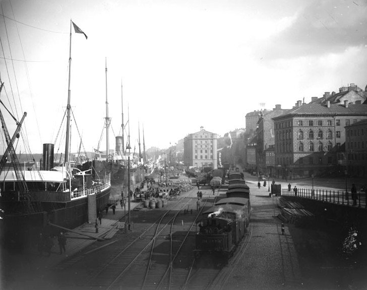 Stadsgården i Stockholm 1896